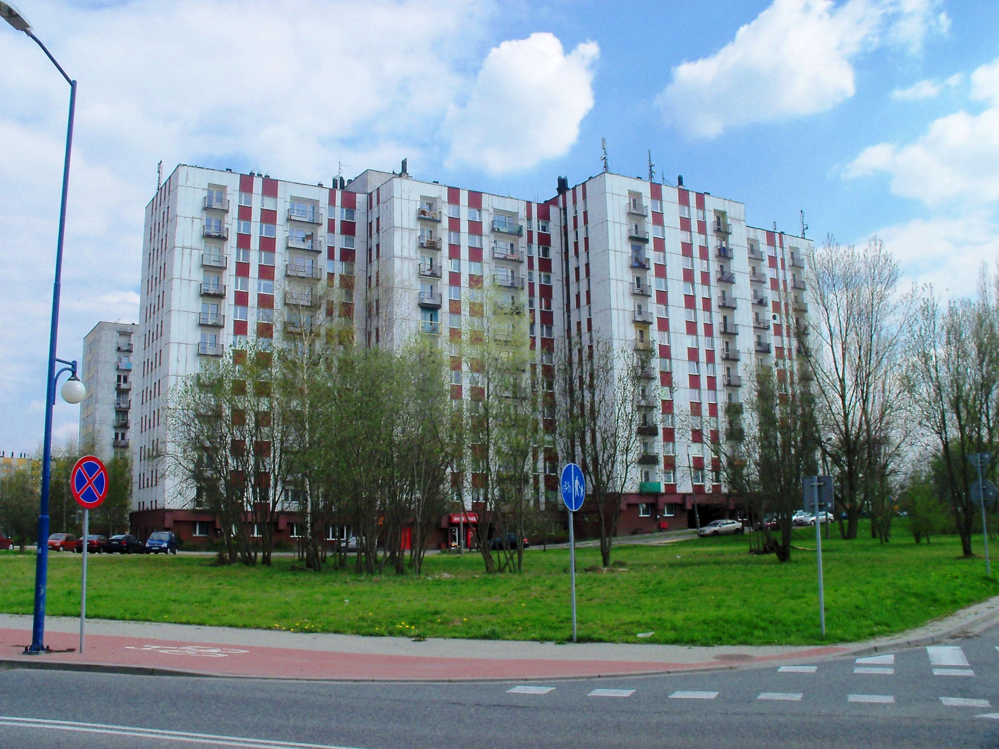 Blok na os. Paderewskiego w Katowicach (widok od strony ul. Damrota)